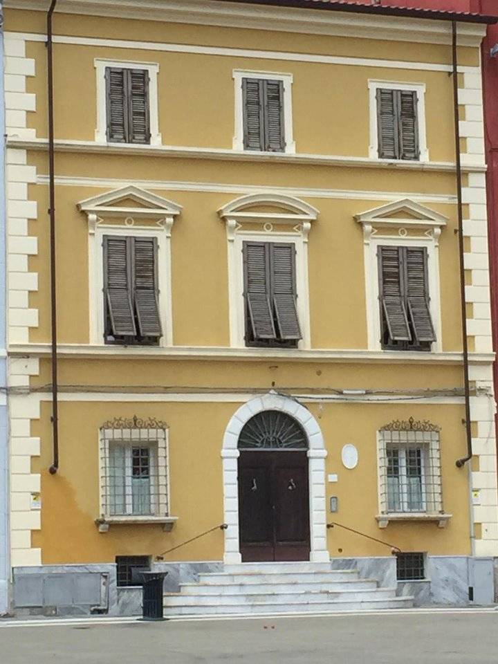 sdss